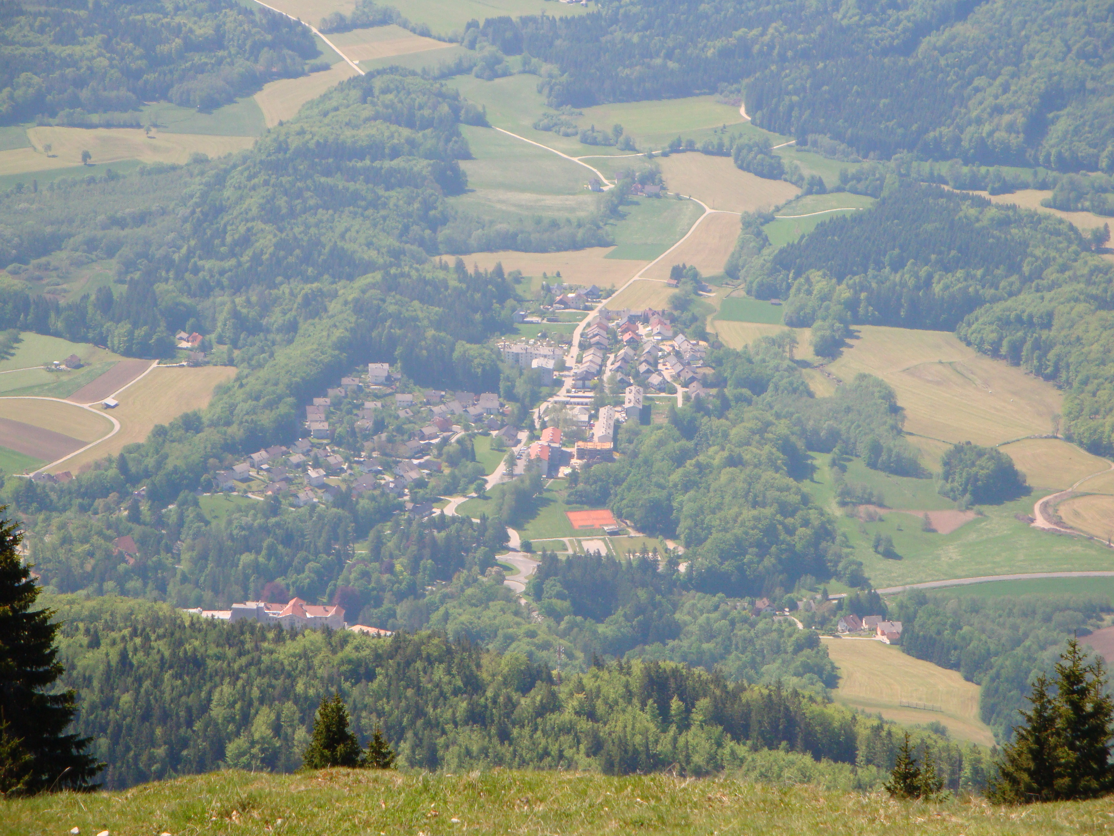 Golnik, pogled s Kriške gore